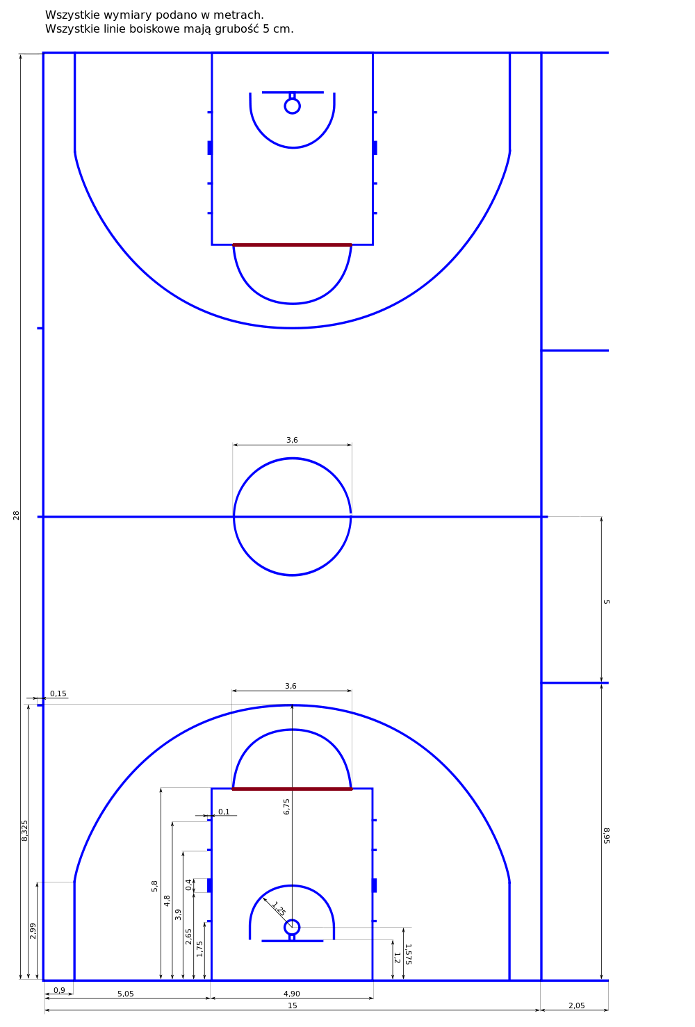 boisko do koszykówki